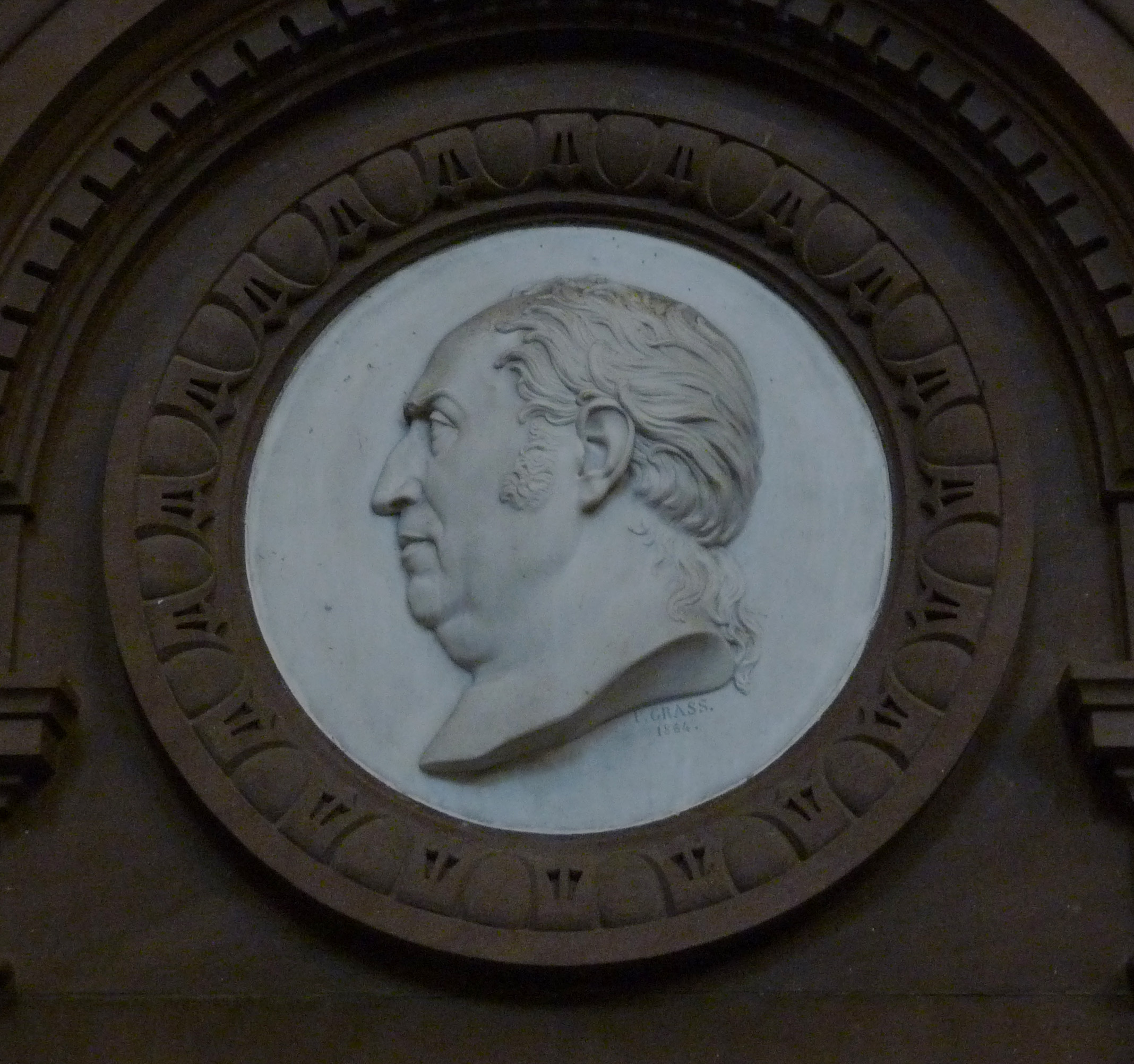 Médaillon du monument funéraire de l'historien André Jung à l'église Saint-Thomas de Strasbourg (médaillon de Philippe Grass)